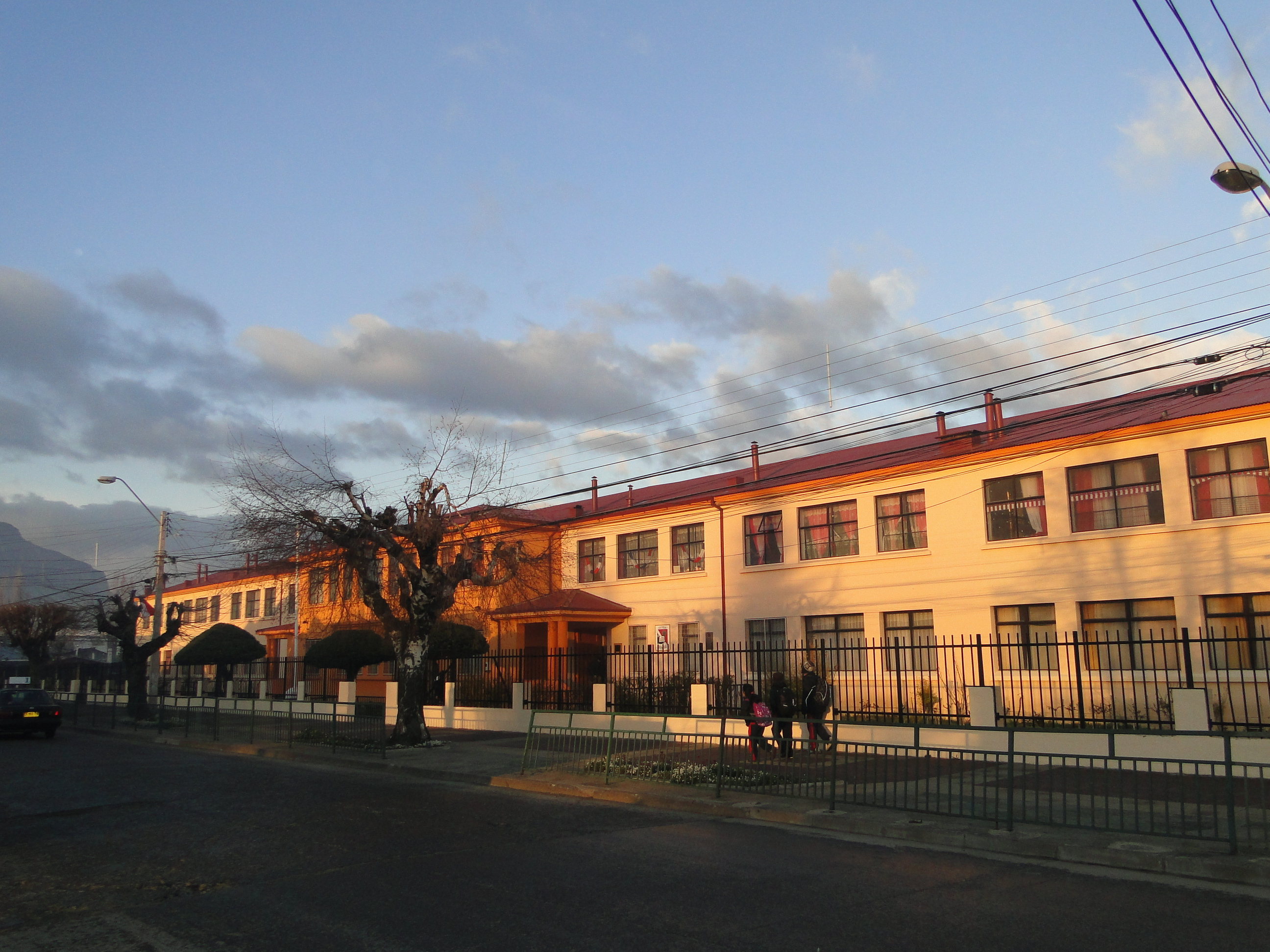 Escuela Pedro Quintana Mansilla This is a photo of a national monument in Chile: 1860